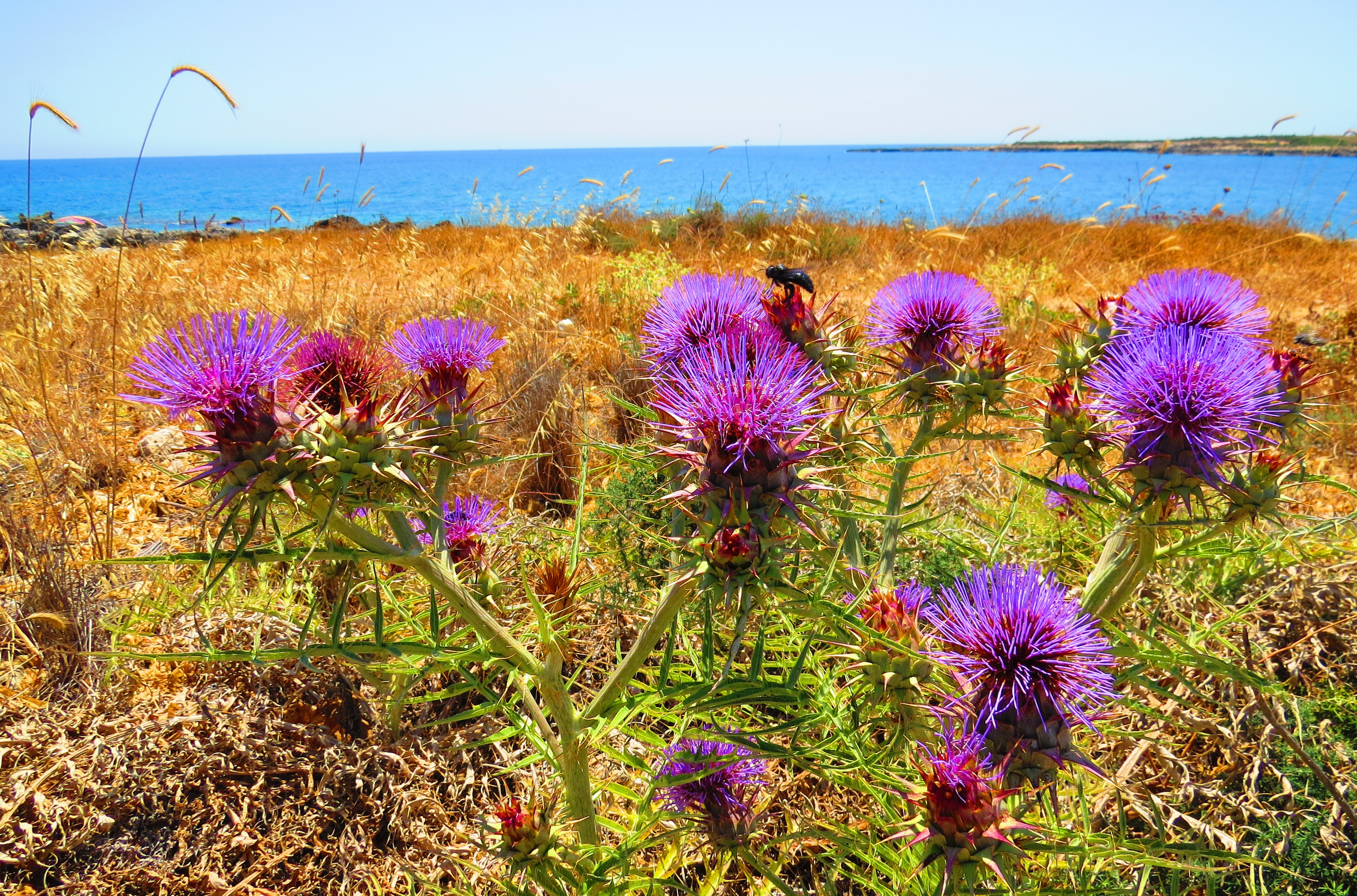 Fiore di Cardo - Spiaggia dell'Arenella (Siracusa)